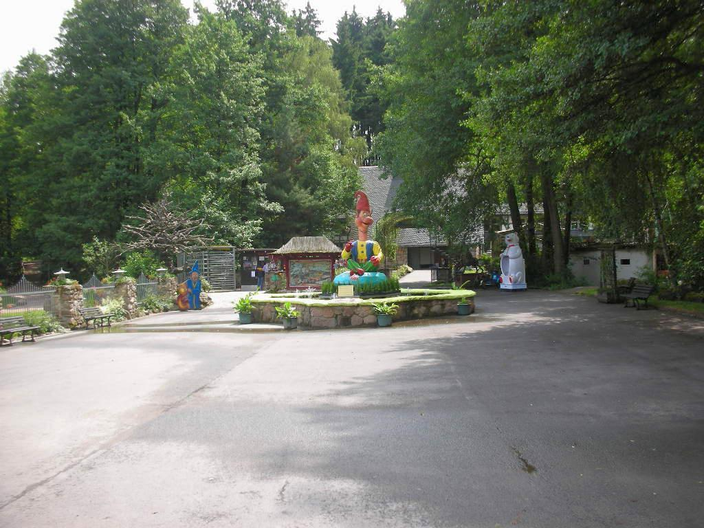 Eingangsbereich des Freizeitparks Plohn